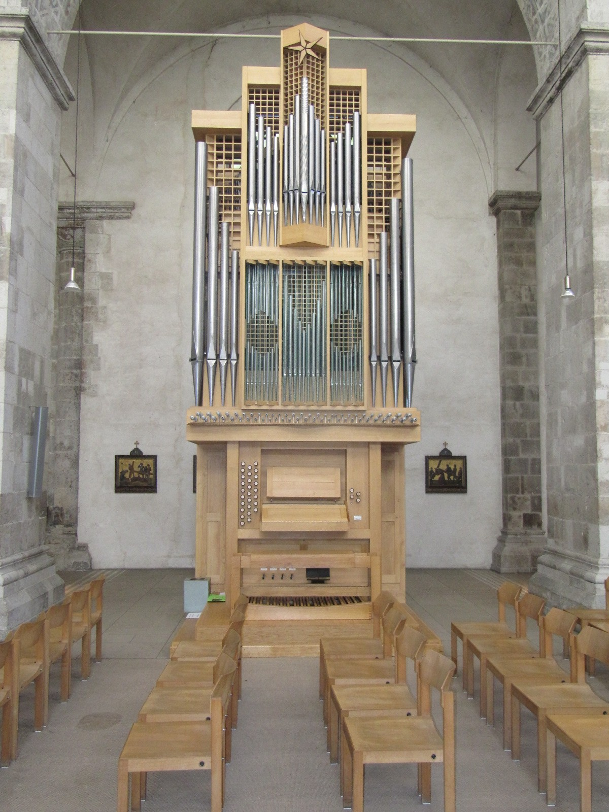 Die Orgel der Firma Fleitner stammt aus der Krankenhauskapelle Borghorst, wurde 1987 erbaut und 2015 von Orgelbau Krawinkel nach Groß St. Martin nach Veränderungen übertragen. Das dreimanualige mechanische Schleifladeninstrument mit 21 klingenden Registern verfügt über zahlreiche Transmissionen und Extensionen.